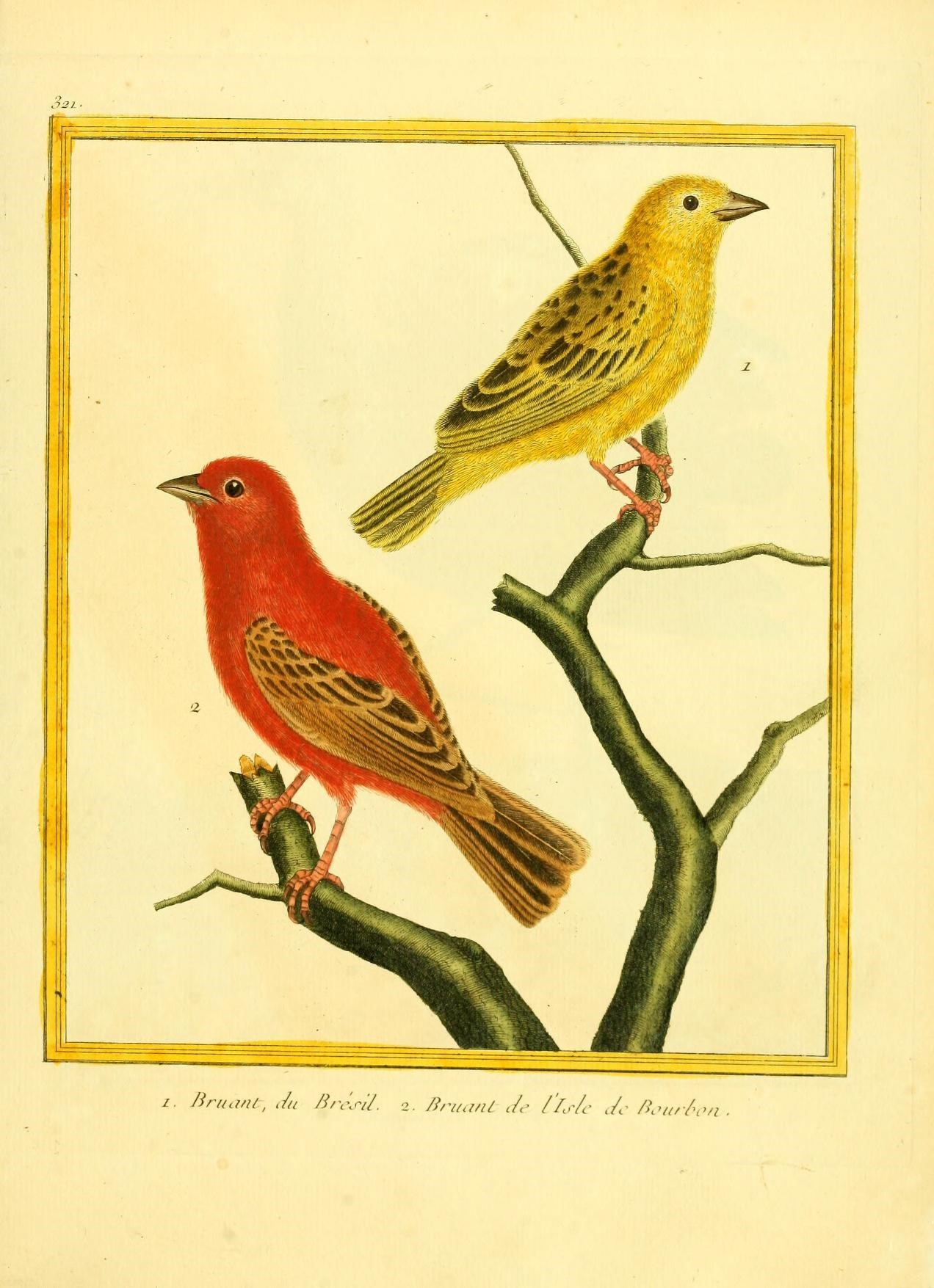 /. /iriuuil , ./a Brc.ril, ._., /.ru,i,il Jr /'/oVc Je /?.v//A' /^